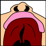 Bilateral complete cleft lip (left side)